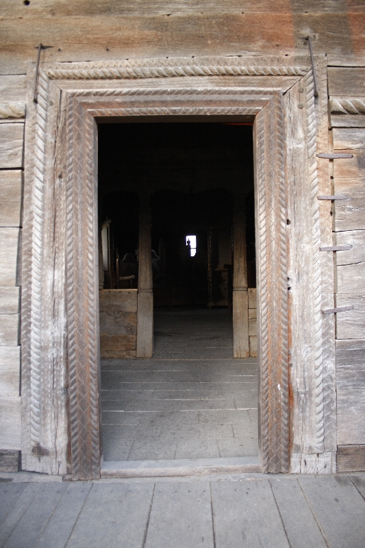 Lăcaşul de lemn de la Străoane, monument istoric clasat Cod LMI VN-II-m-A-06559, datează din veacul al XVII-lea, fiind opera meşterilor populari locali, care au depus întreaga lor măiestrie în lucrătura lemnului. Biserica de la Străoane se încadrează în tezaurul de arhitectură populară romaneasca, fiind o simbioză între stilurile arhitecturale din Moldova şi Transilvania.